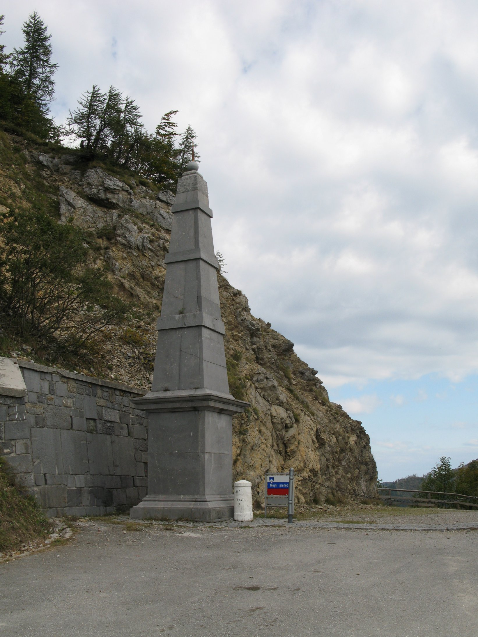 Označena mejna črta na Starem Ljubelju